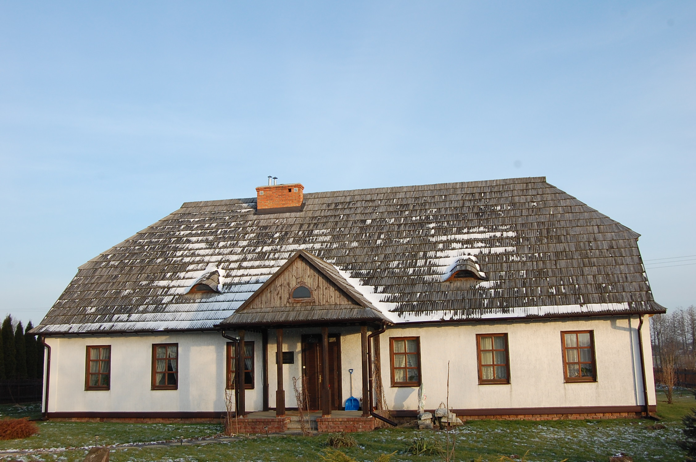 Budynek magisteriatu miasta Lubartowa translokowany do Konopnicy